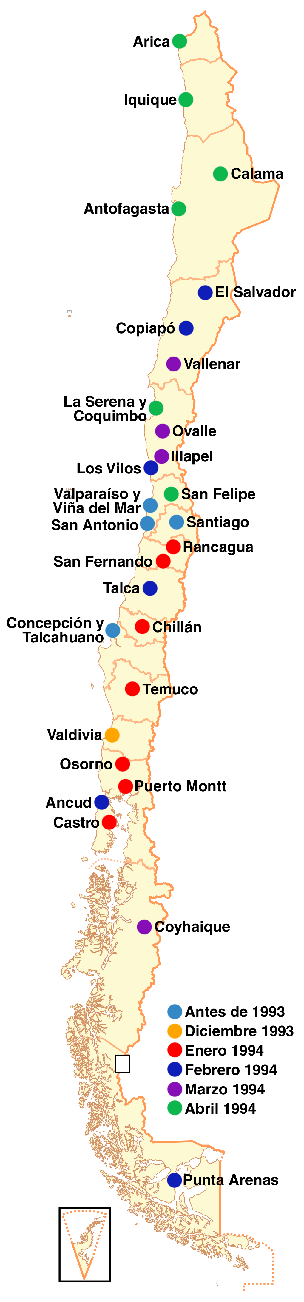 Mapa con las principales ciudades donde se instalaron frecuencias de Chilevisión entre 1993 y 1994.